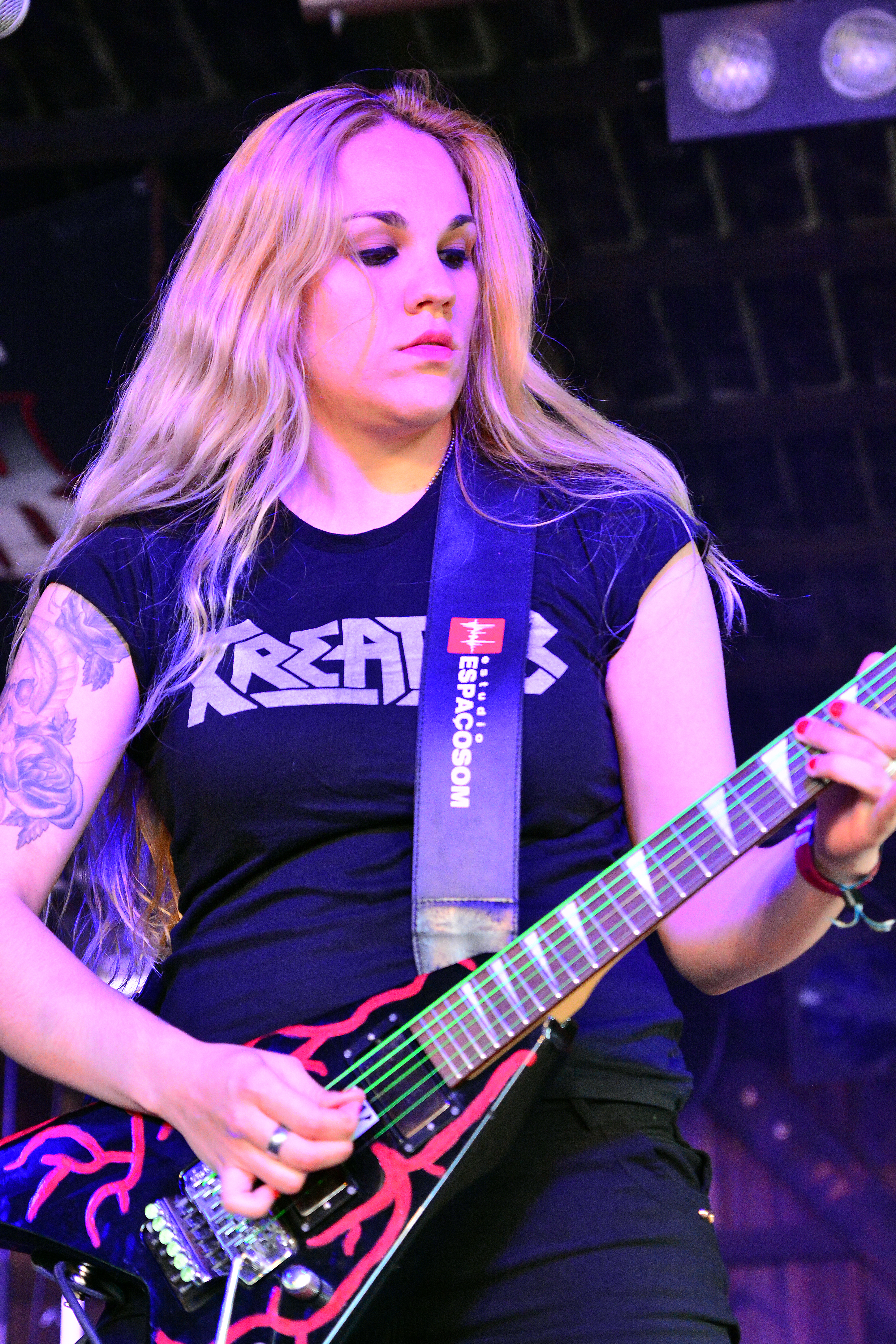 Nervosa beim Headbangers Open Air 2015